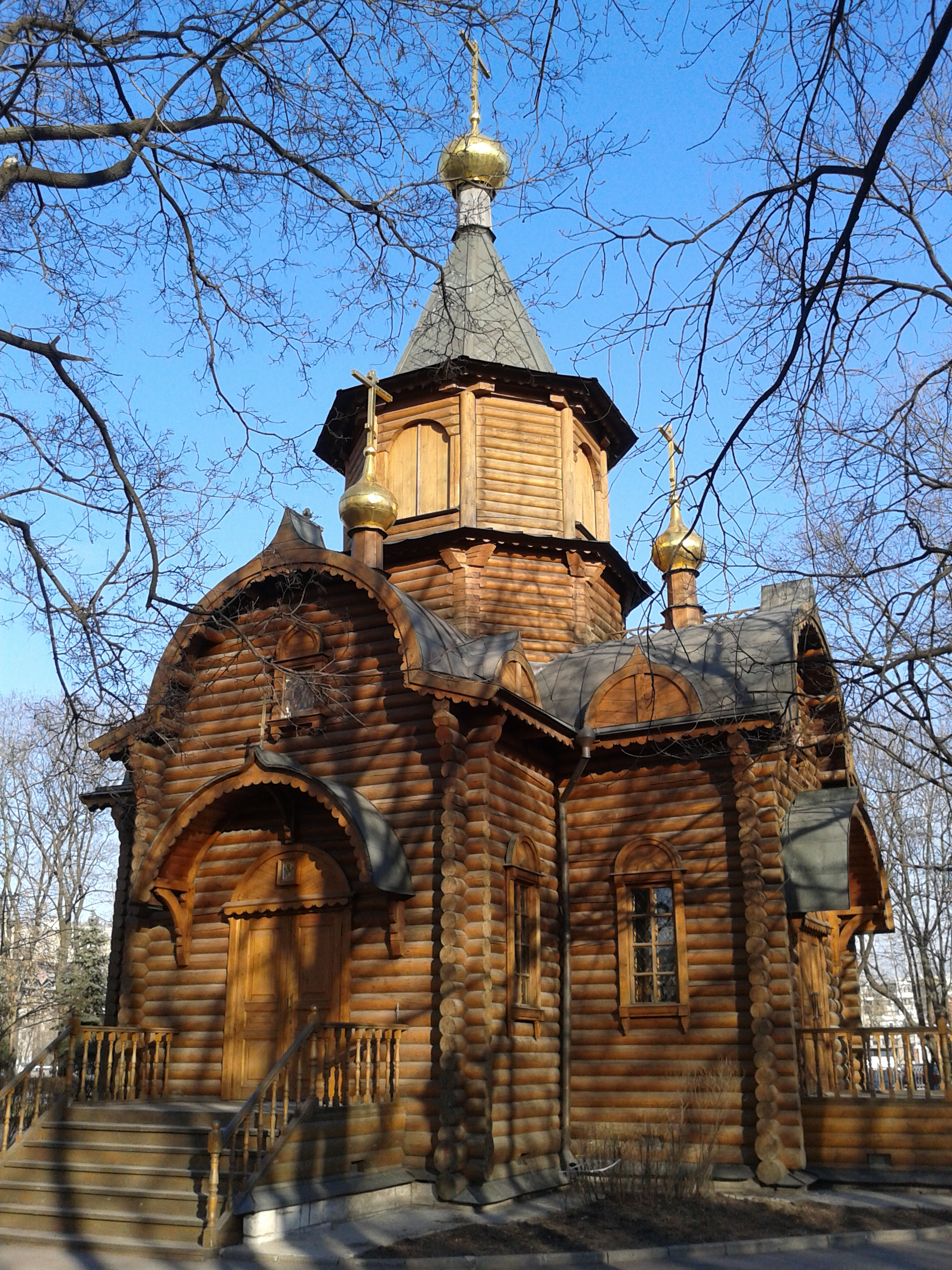 Храм Державной иконы Божией Матери, Москва. Комплекс Храма Христа Спасителя